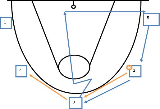 Zagrywka koszykarska (teoria)